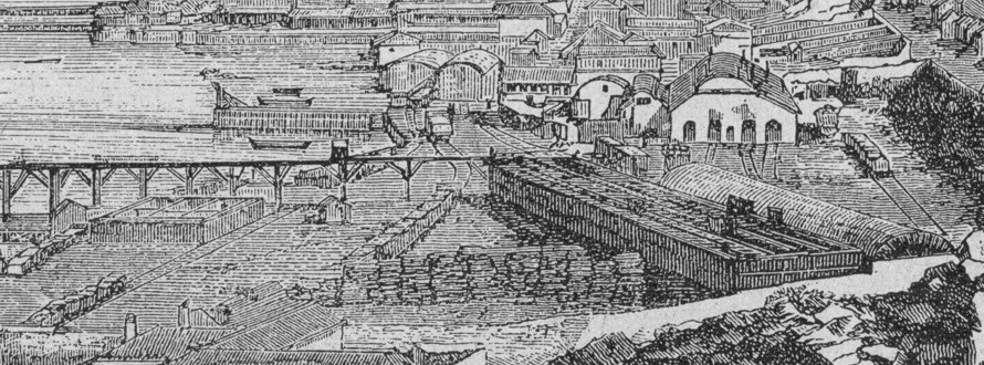 Antiguo puerto y estación de ferrocarriles de Coquimbo. Grabado de 1872 (aprox.)